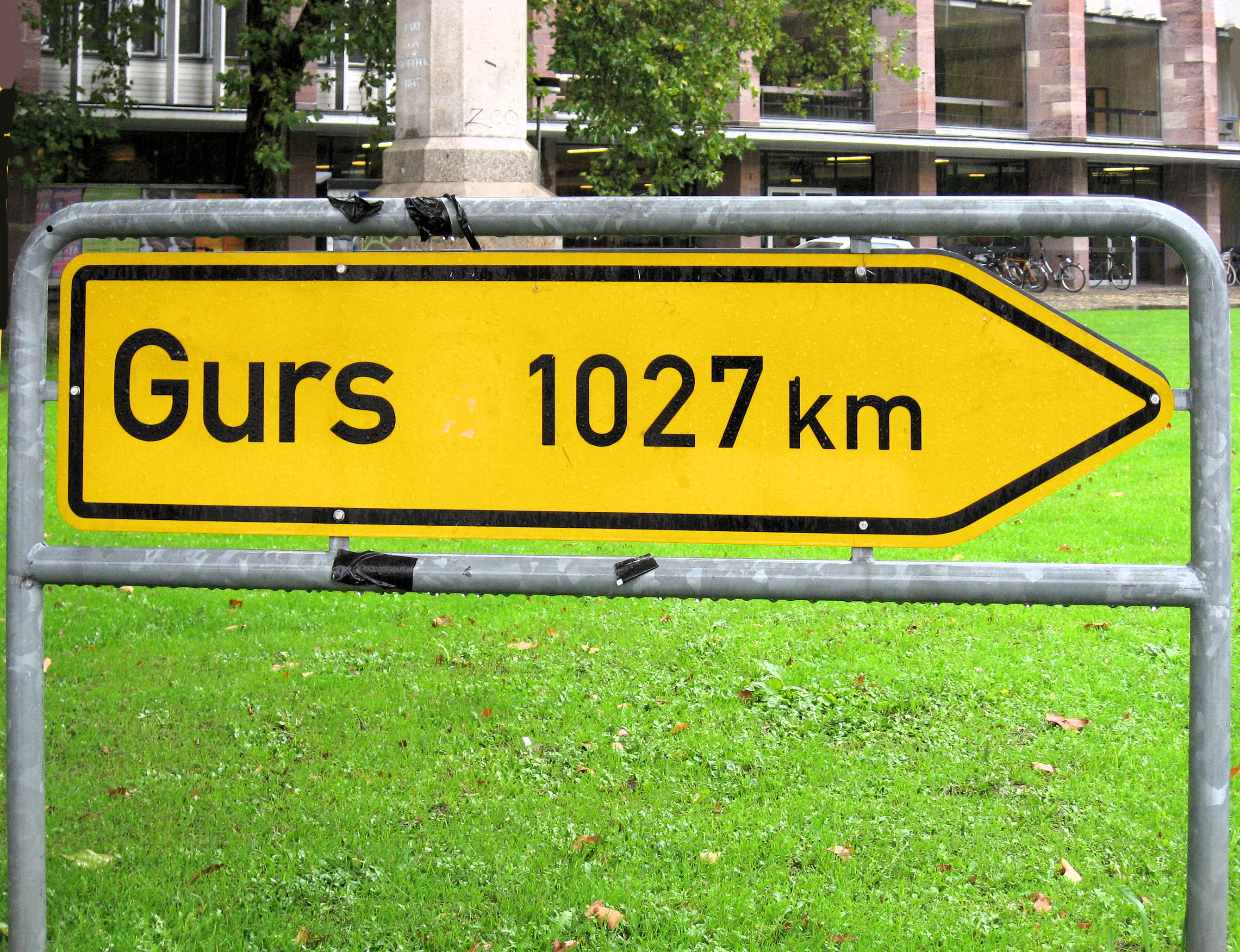 Memorial for the deportation of Jews to the camp in Gurs in southern France